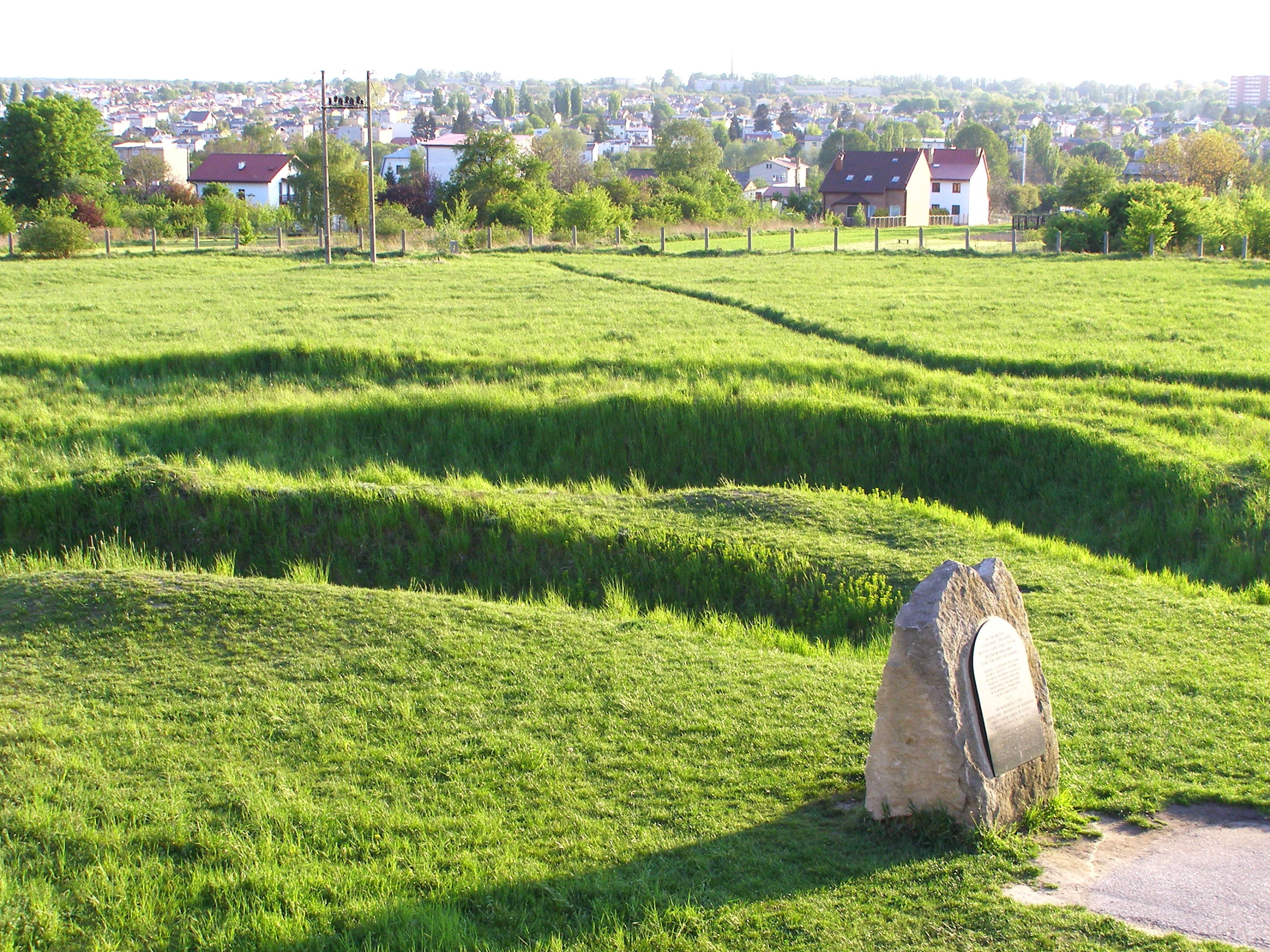 Miejsce zamordowania 18400 Żydów - więźniów Majdanka w Lublinie